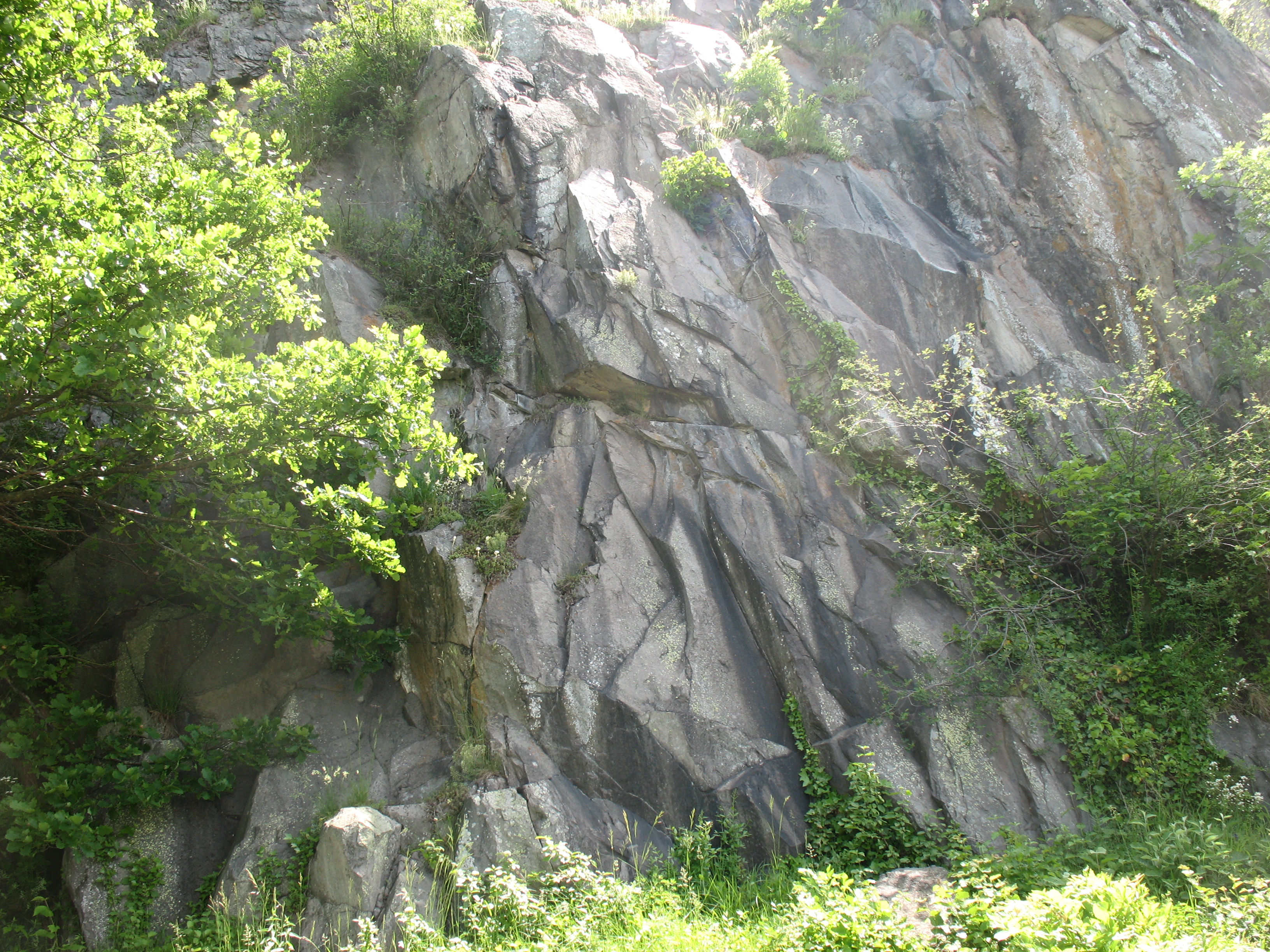 Phonolith-Fels am Aufgang zur "Oberen Festung" der Festung Hohentwiel